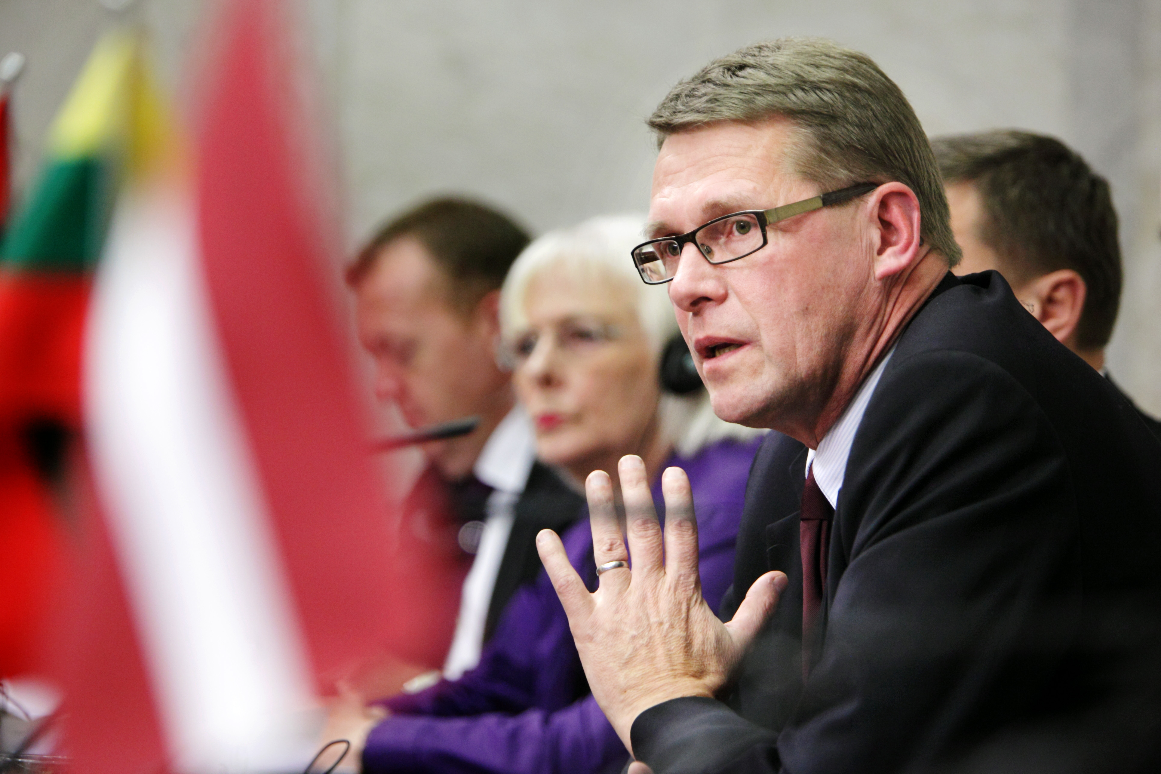 Finlands statsminister Matti Vanhanen på pressmöte vid Nordiska rådet session i Stockholm 2009.